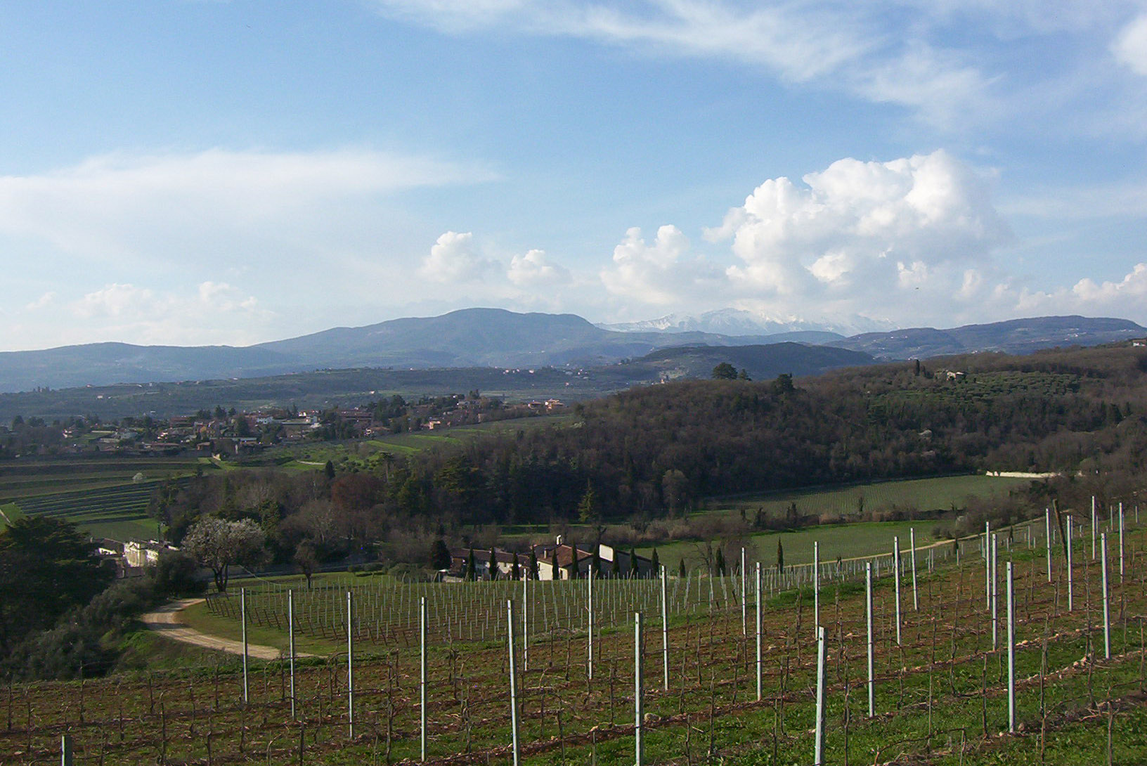 Vista della Valpolicella dalle colline sopra Novare